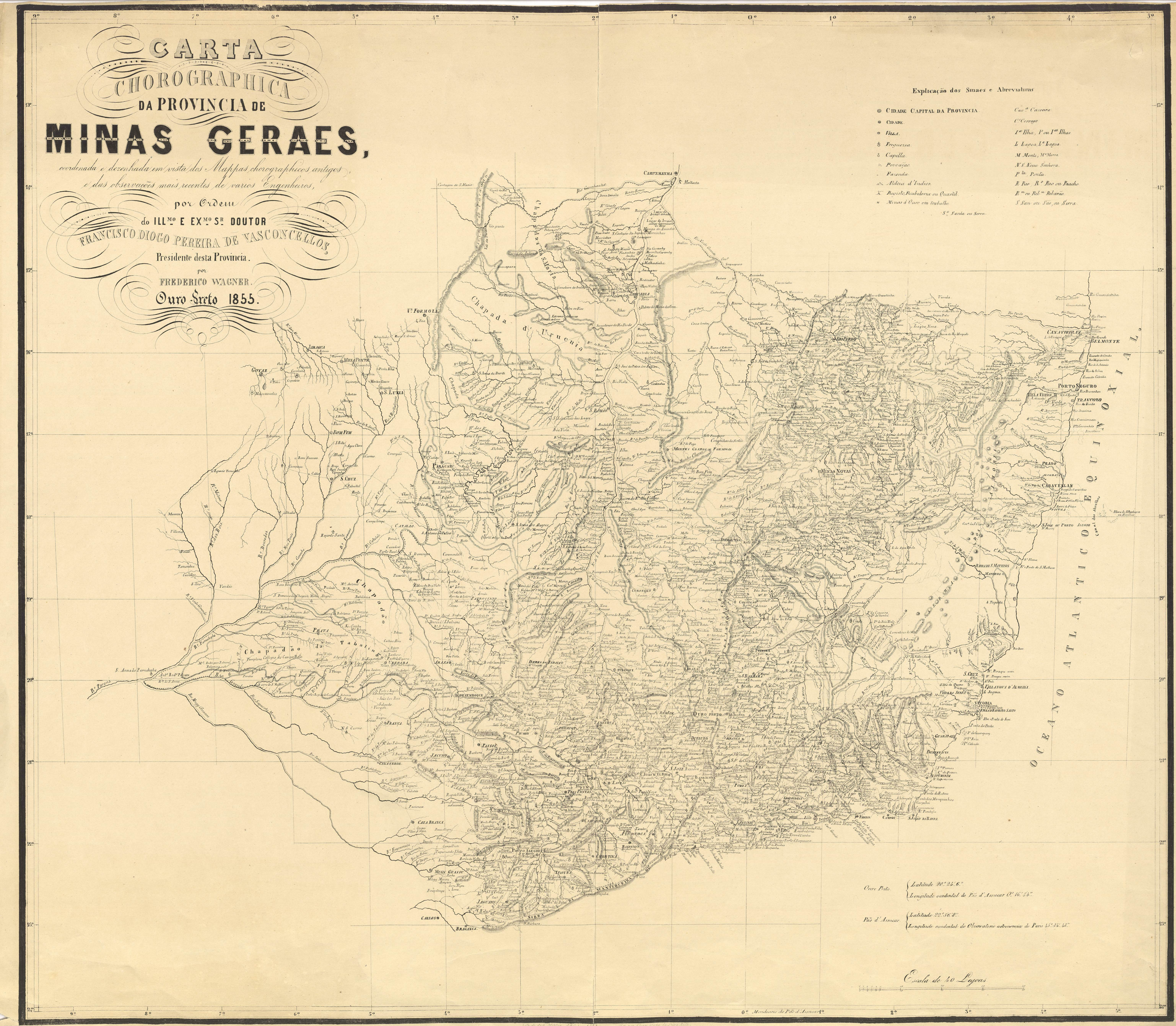 Carta Chorographica da Provincia de Minas Geraes : coordenada e dezenhada em vista dos Mappas chorographicos antigos e das observaçoes mais recentes de varios Engenheiros por Orden do Illmo. E Exmo. Sr.Dovtor Francisco Diogo Pereira de Vasconcellos.